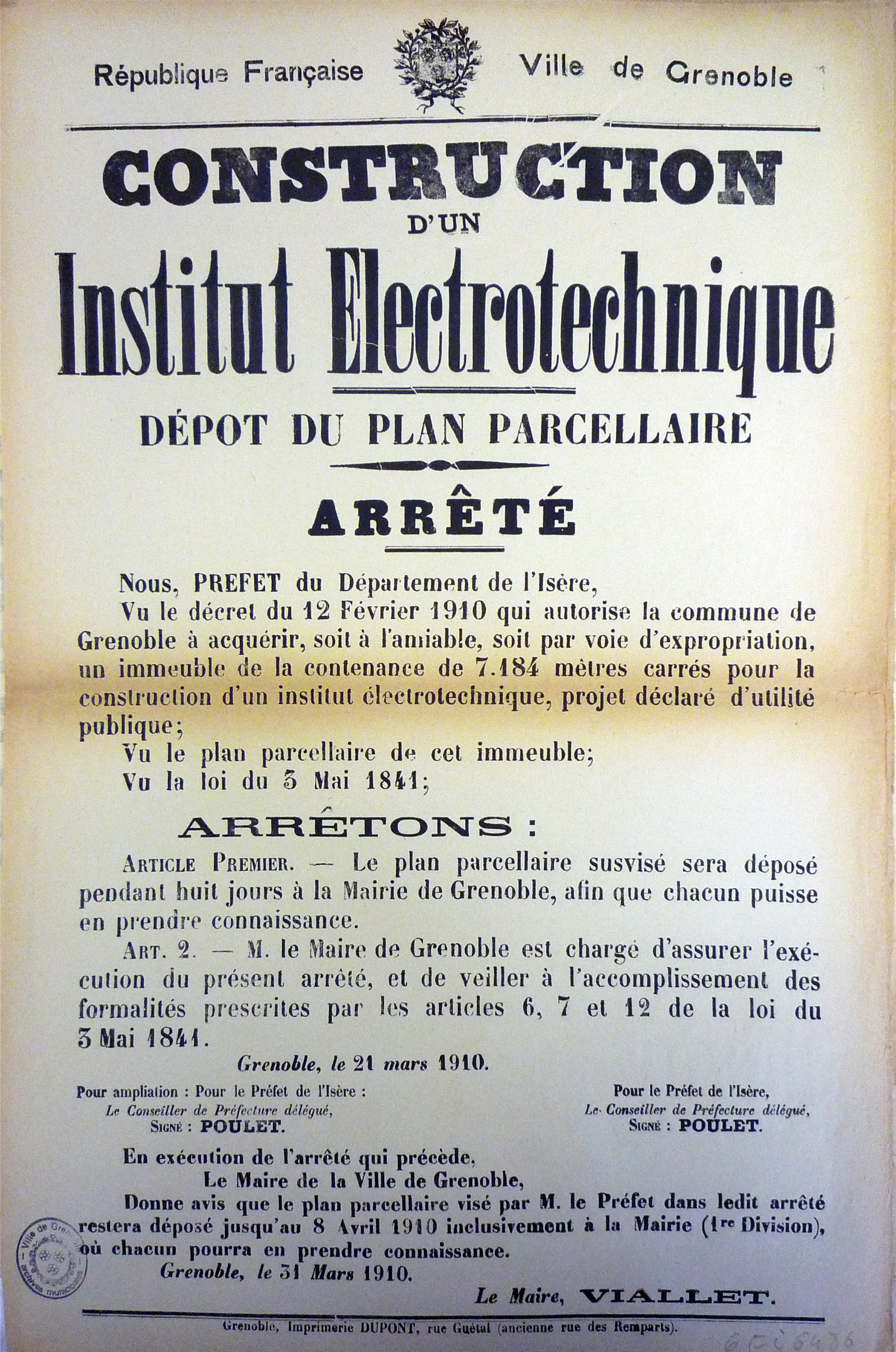 Avis de création d'un institut électrotechnique à Grenoble en 1910. Archives municipales de Grenoble, cote 6FI6441 à 6486